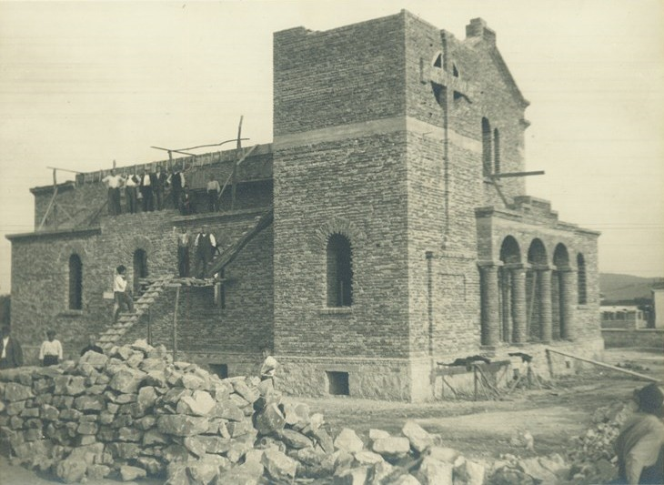 Строежът на църквата в Дългопол. Ръководител на строежа е майсторът Коста Миланов Петров (1904-1989).